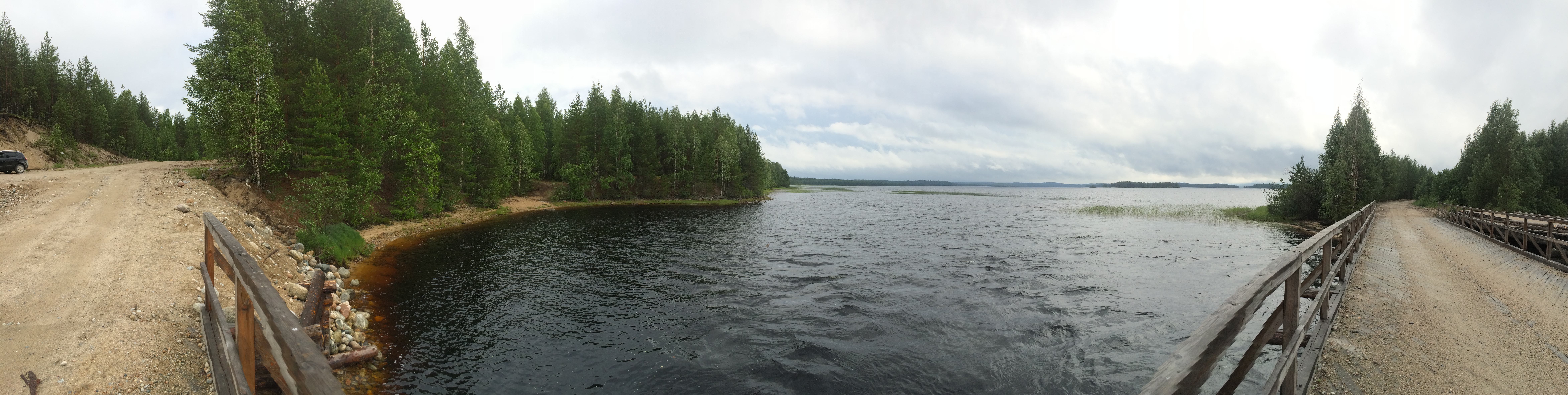 Унутозеро